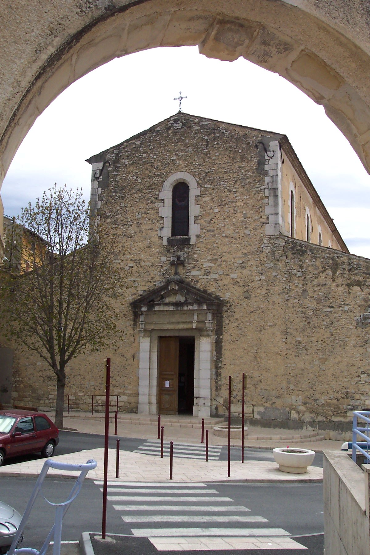 Église Notre-Dame de l'Assomption de Riez (façade principale), ancienne cathédrale Notre-Dame-de-la-Sède, reconstruite au milieu du XIXe.